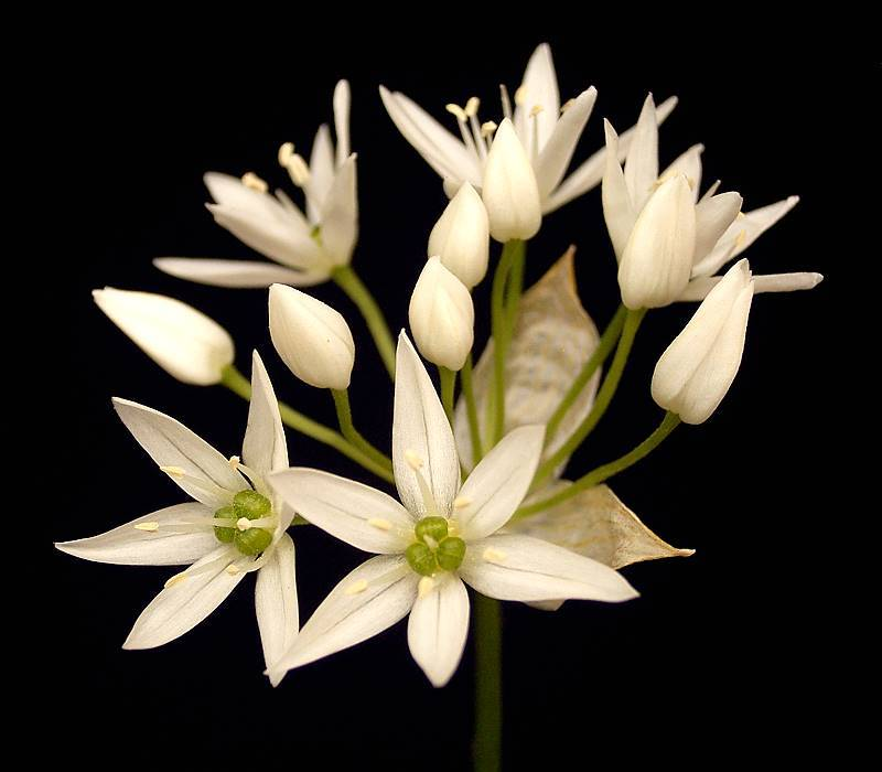 Allium ursinum